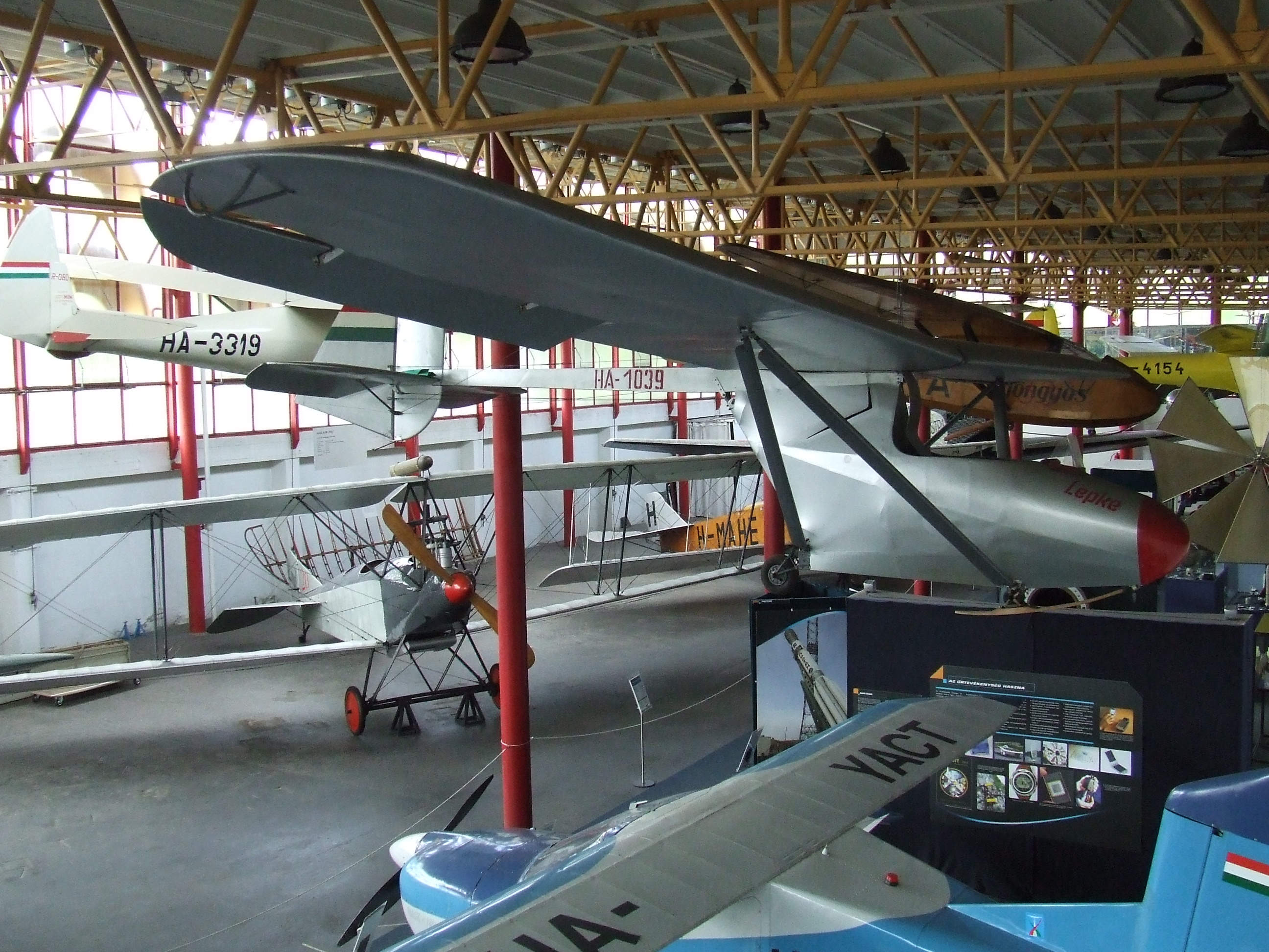 Petőfi Csarnok, Repüléstörténeti kiállítás